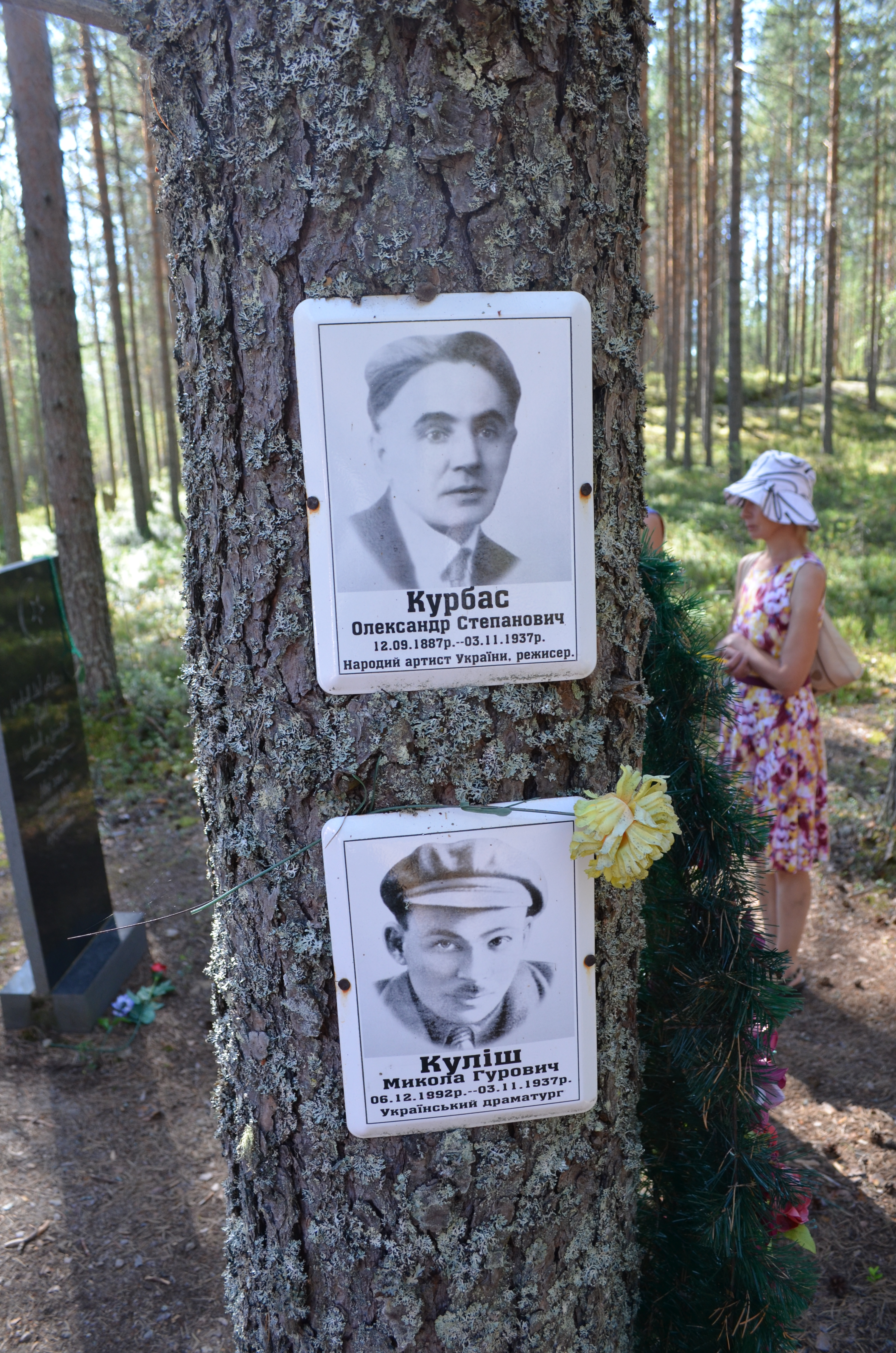 Урочище Сандармох. Дні пам’яті. Інформація про загиблих українців